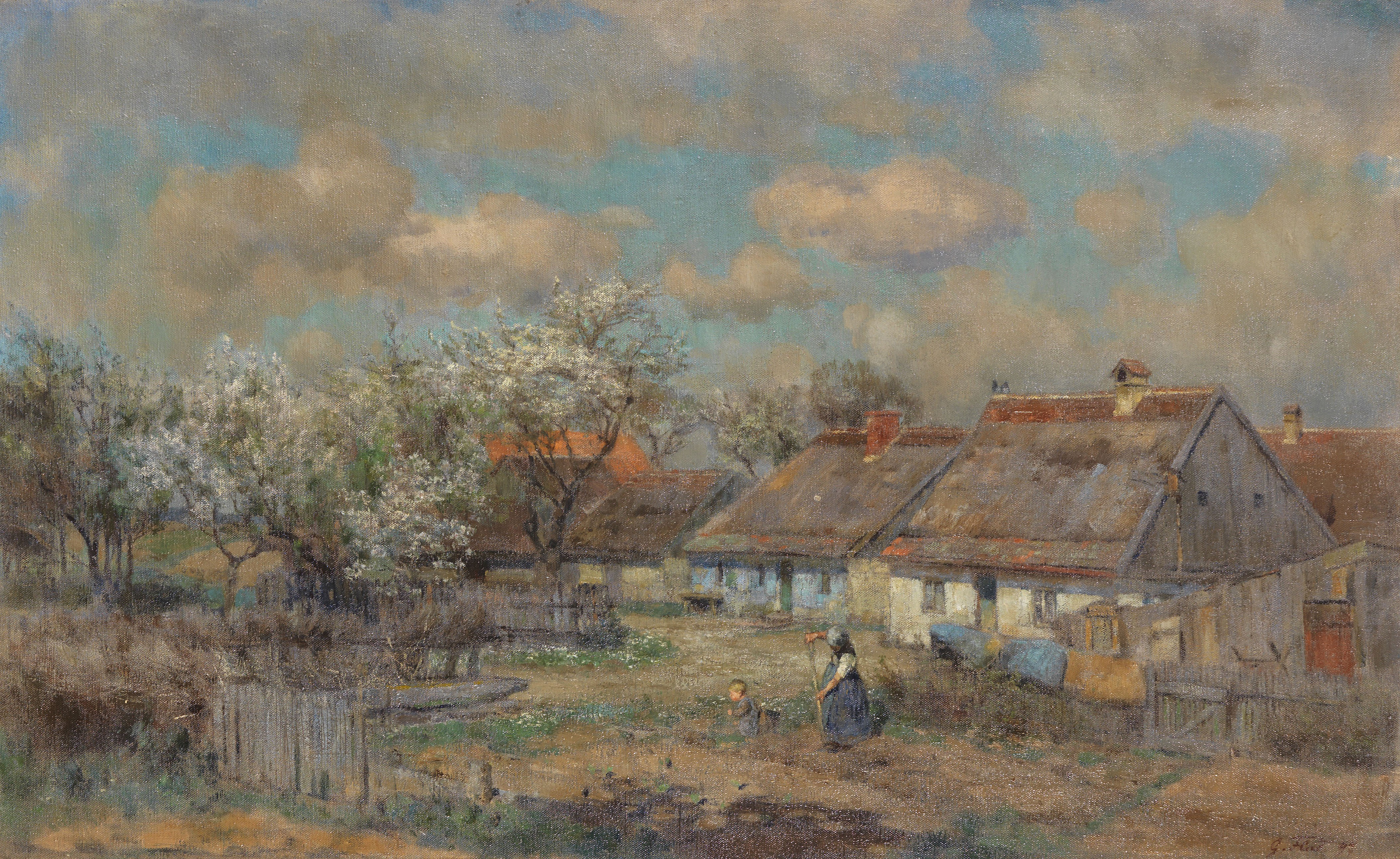 Ein Maitag (Dorfansicht mit Gemüsegärten). 1897. Öl auf Leinwand. Rechts unten signiert und datiert. 62 x 100 cm. Ausstellung: Große Berliner Kunst-Ausstellung, 1898 (verso mit fragmentarischen Etiketten; vermutlich Kat.-Nr. 264).